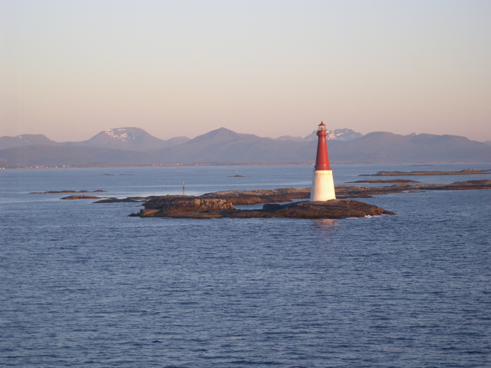 Grip fyr